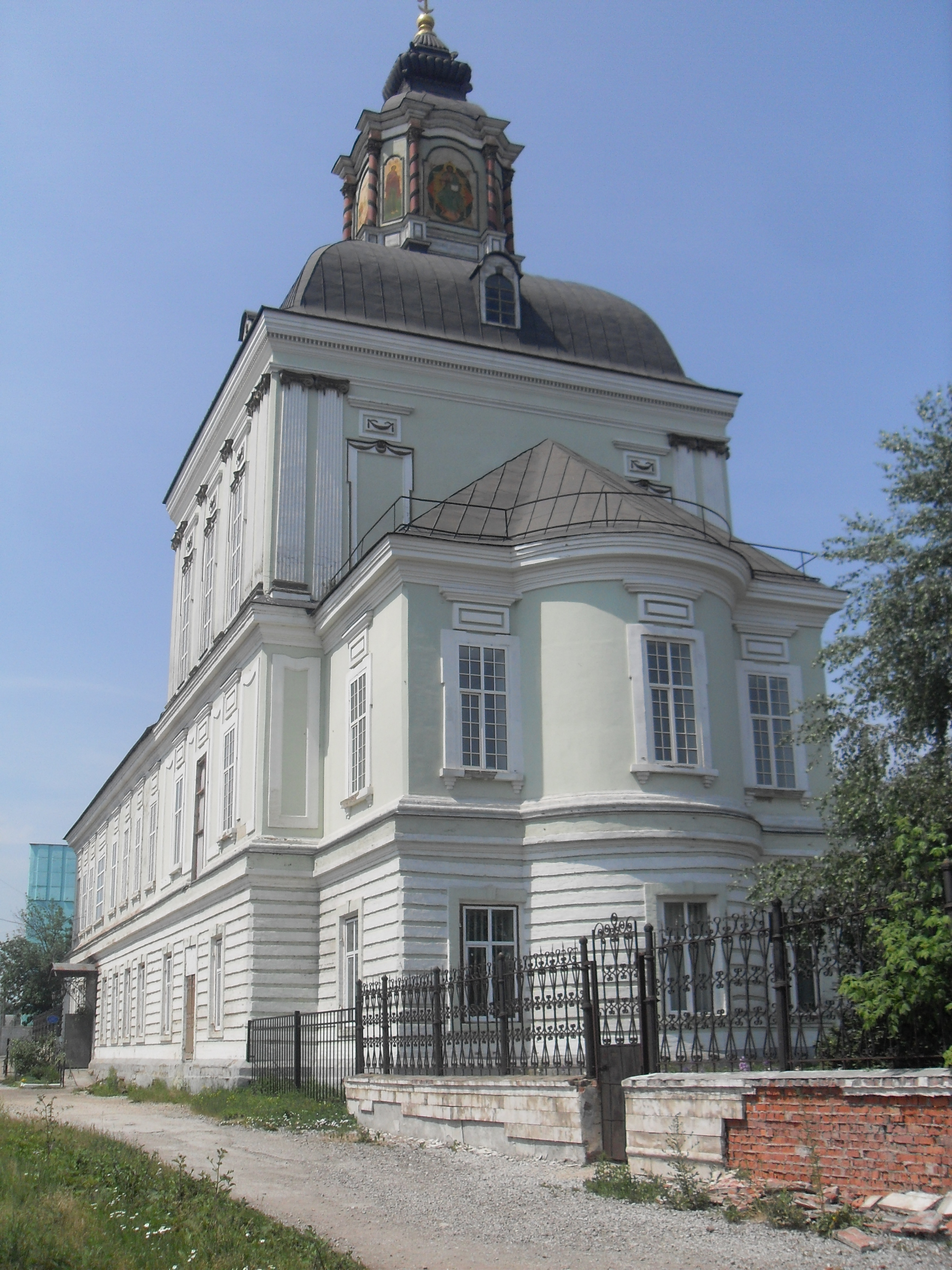 Николо-Зарецкий храм в г. Тула (построен на средства Акинфия Никитича Демидова)